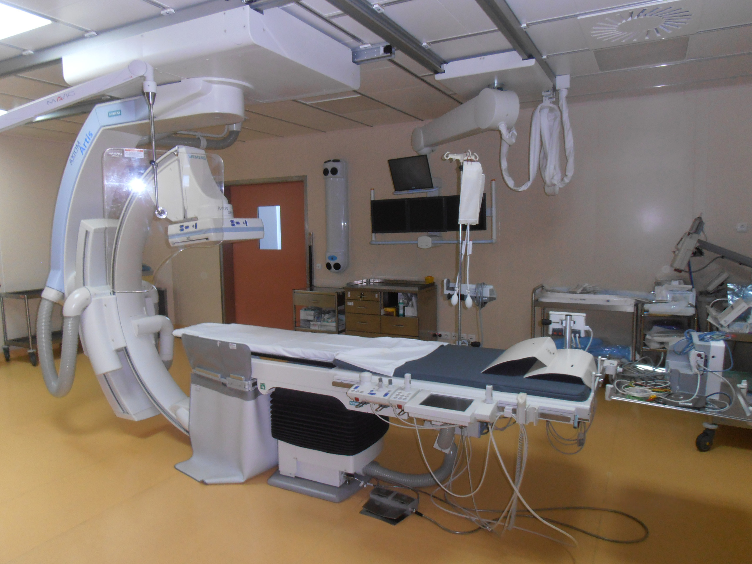 Эндоскоп. Федеральный центр нейрохирургии в Тюмени (пос. Патрушево, Червишевский тракт, 4-й км, дом 5).